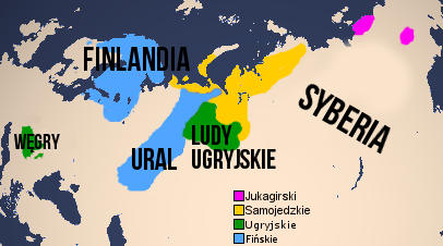 Mapa języków